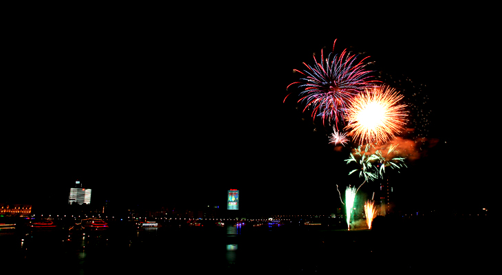 Feuerwerk vom 6. Japan-Tag am 3. Juni 2007 in Düsseldorf. Das Foto wurde mit 2,5 Sekunden und einer Blende von f/10 belichtet. Fotograf: Sebastian Krull